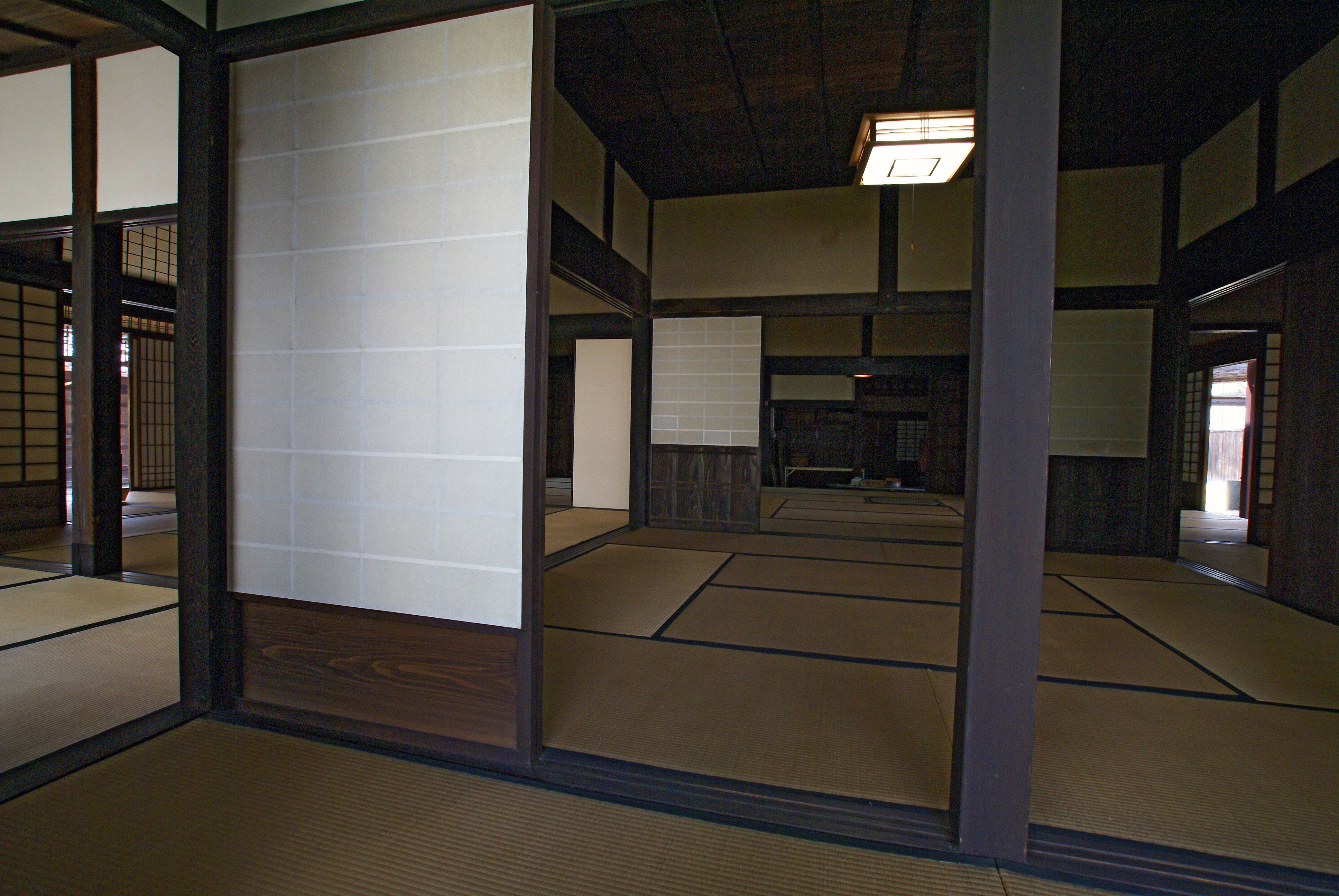 Old Nate-juku Honjin in Kinokawa, Wakayama prefecture, Japan